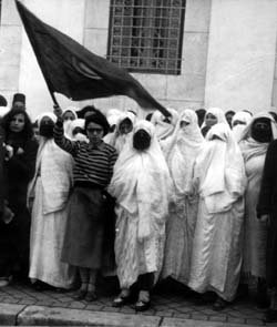 Groupe de manifestantes tunisiennes contre le régime du protectorat